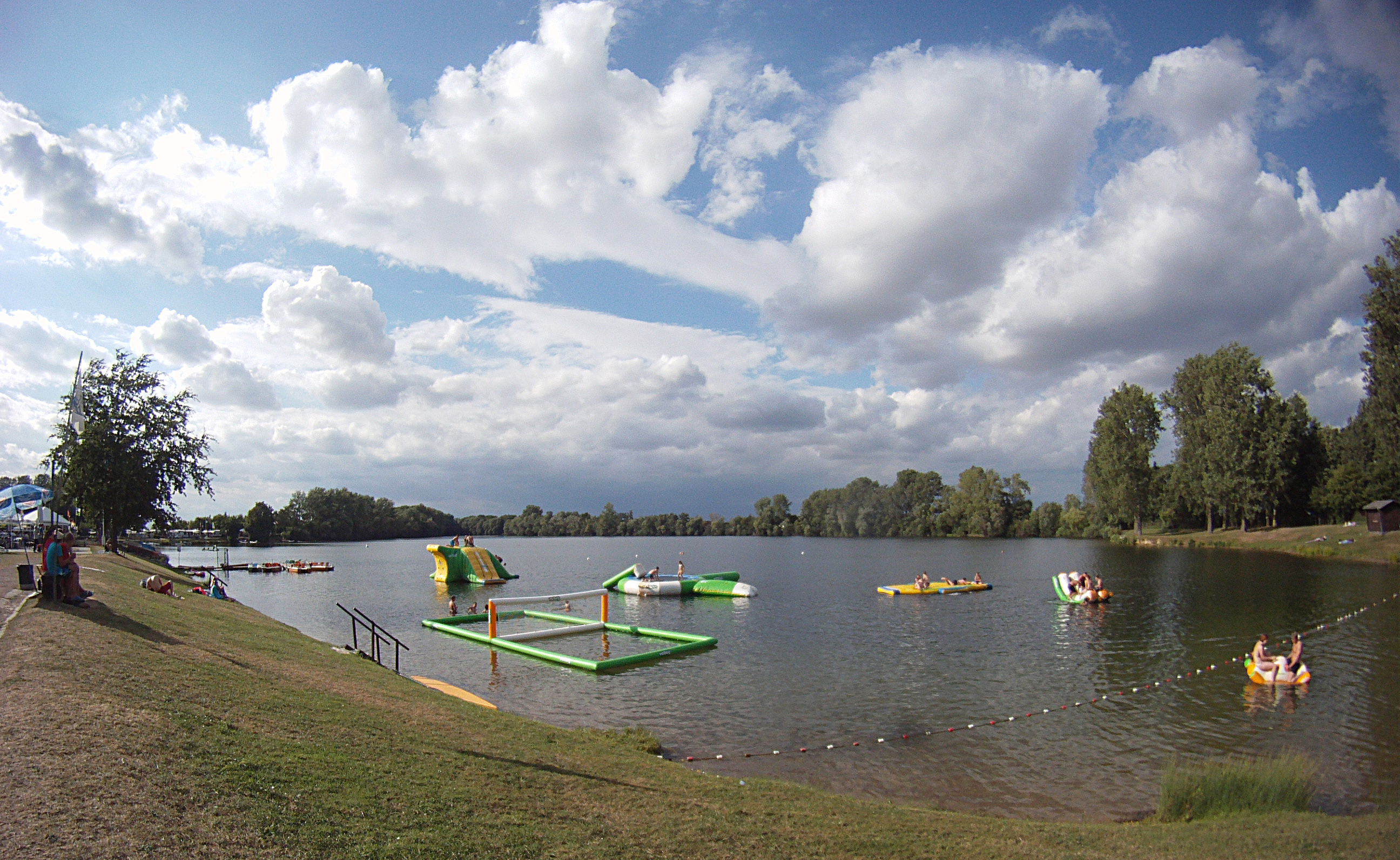 Echtzer See